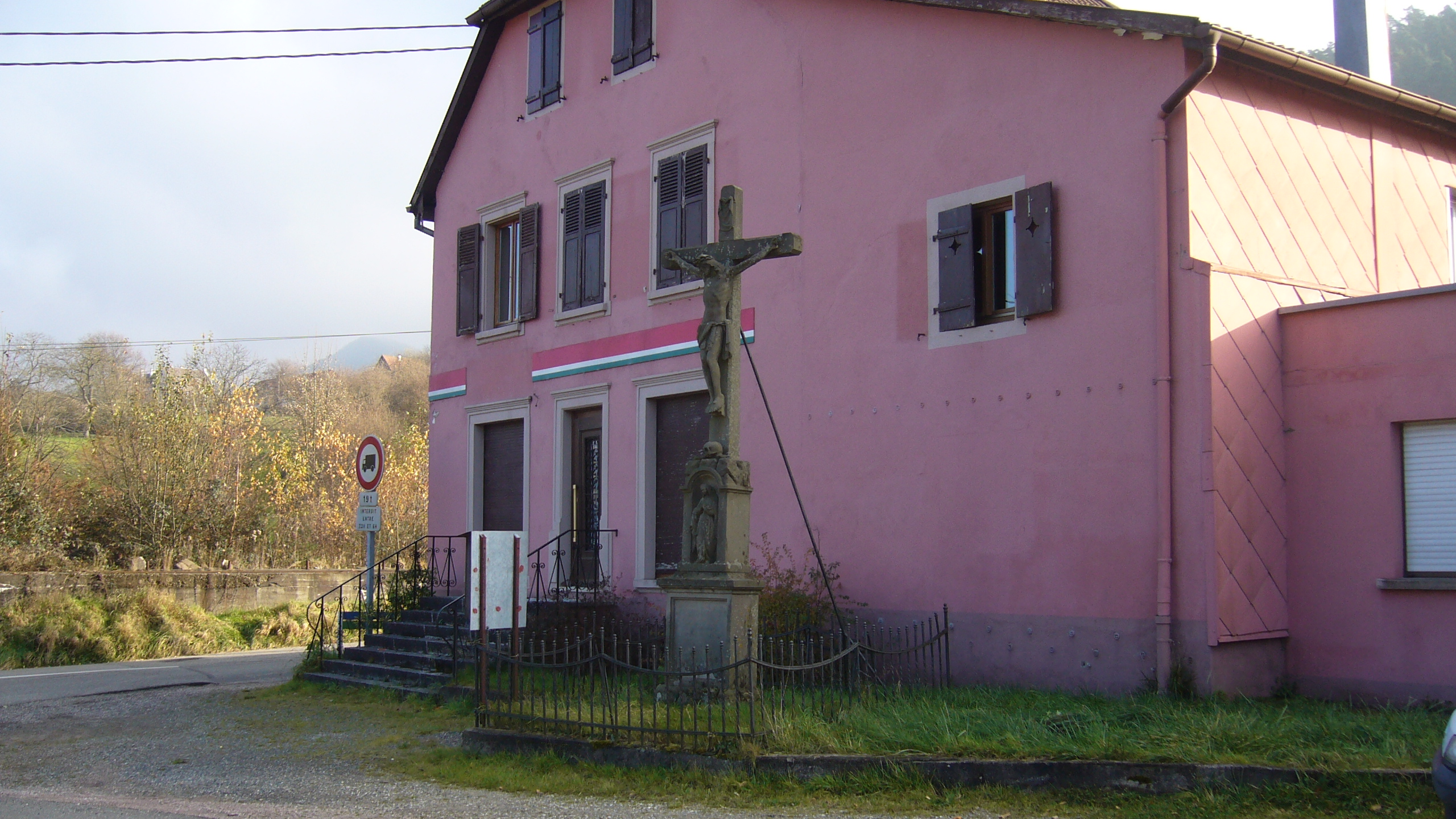 Calvaire Foucht 003.JPG